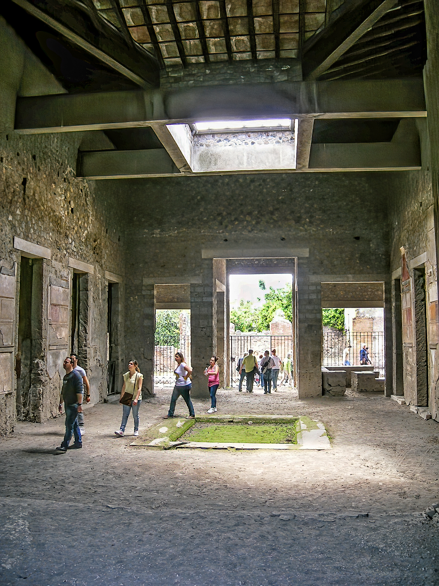 Impluvium della Casa di Sallustio